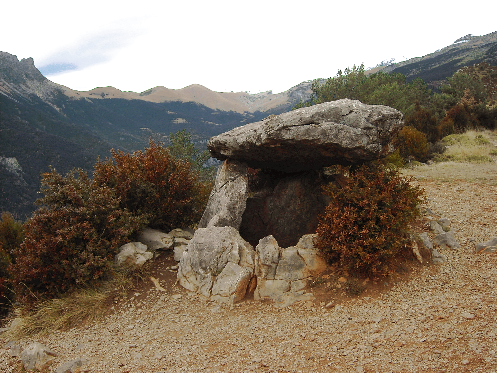 Aragonés: Lo dolmen de Tella, circa 2000 a. de C. En dicen tamien la Piedra de La Vasar u Losa de la Campa.